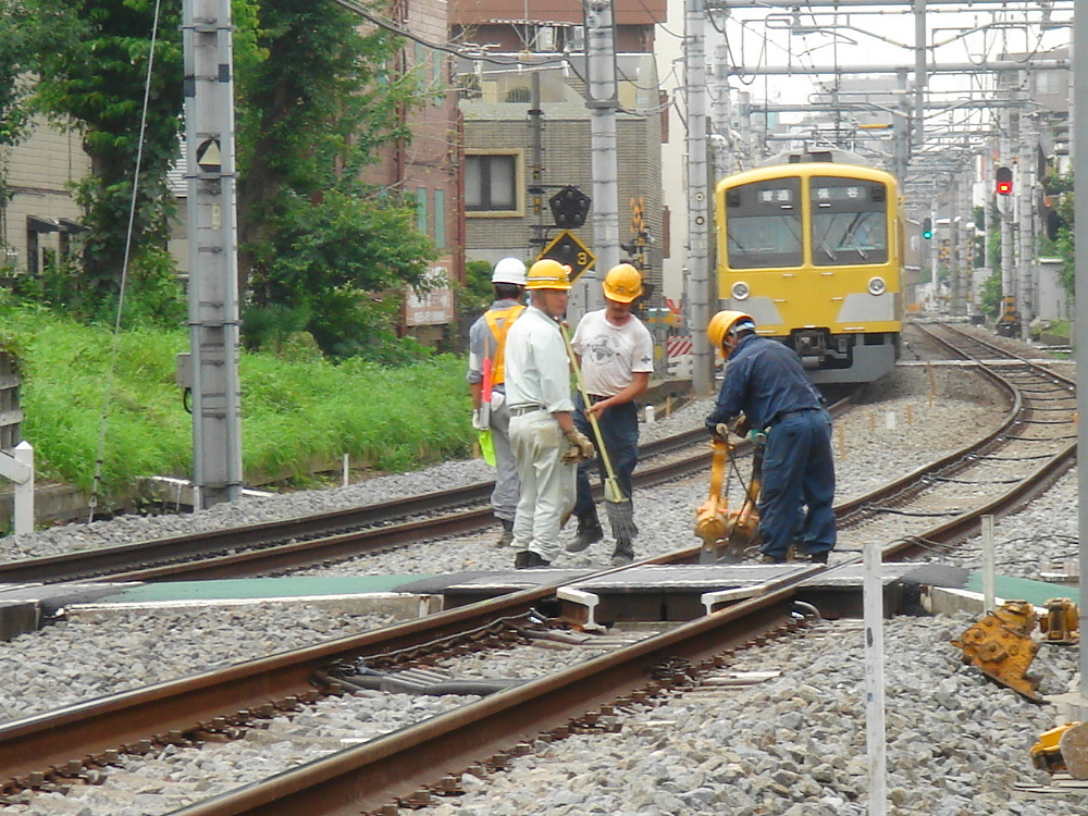 Maintenance of Seibu Ikebukuro Line.